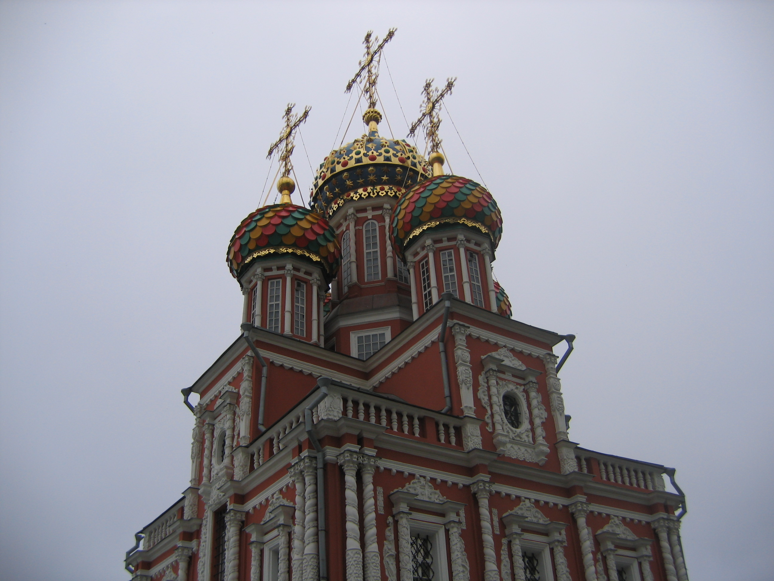 Церковь Собора Пресвятой Богородицы (Строгановская) с колокольней: улица Рождественская, 34а, Нижний Новгород, Нижегородская область